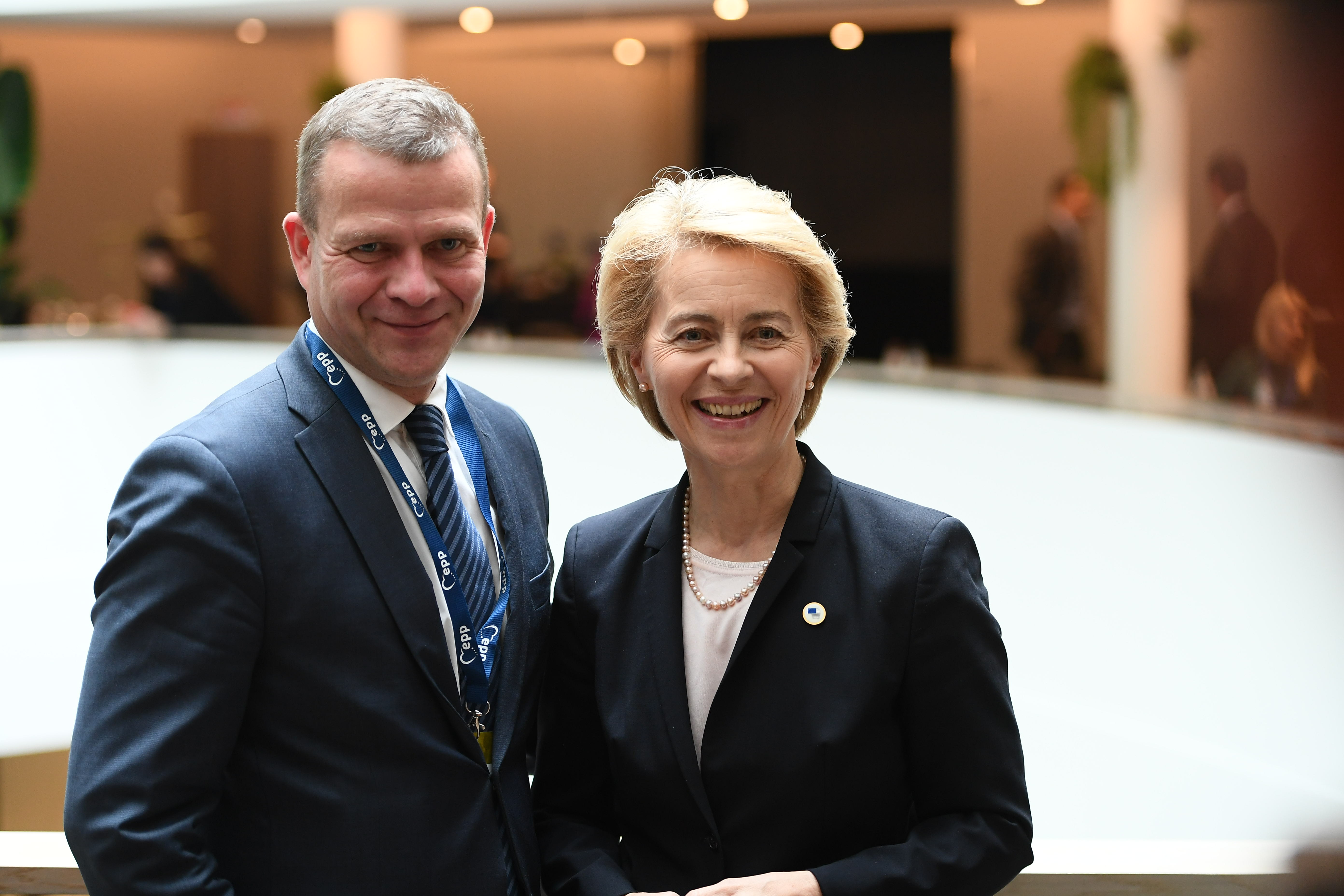 EPP Summit, Brussels, 17 October 2019